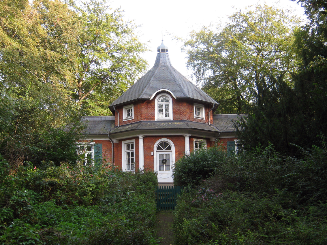 Stadtwaldaufseherhaus in Bremen.Das abgebildete Objekt ist ein geschütztes Kulturdenkmal in der Freien Hansestadt Bremen, mit der Nr. 0218,T041 beim Landesamt für Denkmalpflege registriert.